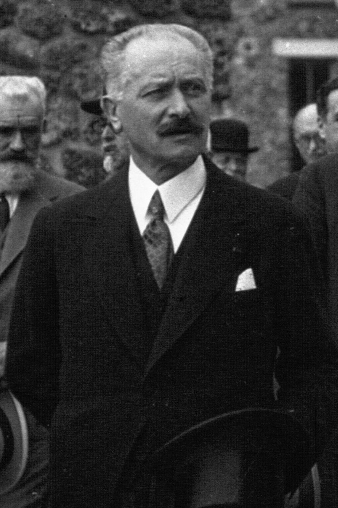 Inauguration de l'Institut du Cancer à Villejuif : Albert Lebrun (photographie de presse)